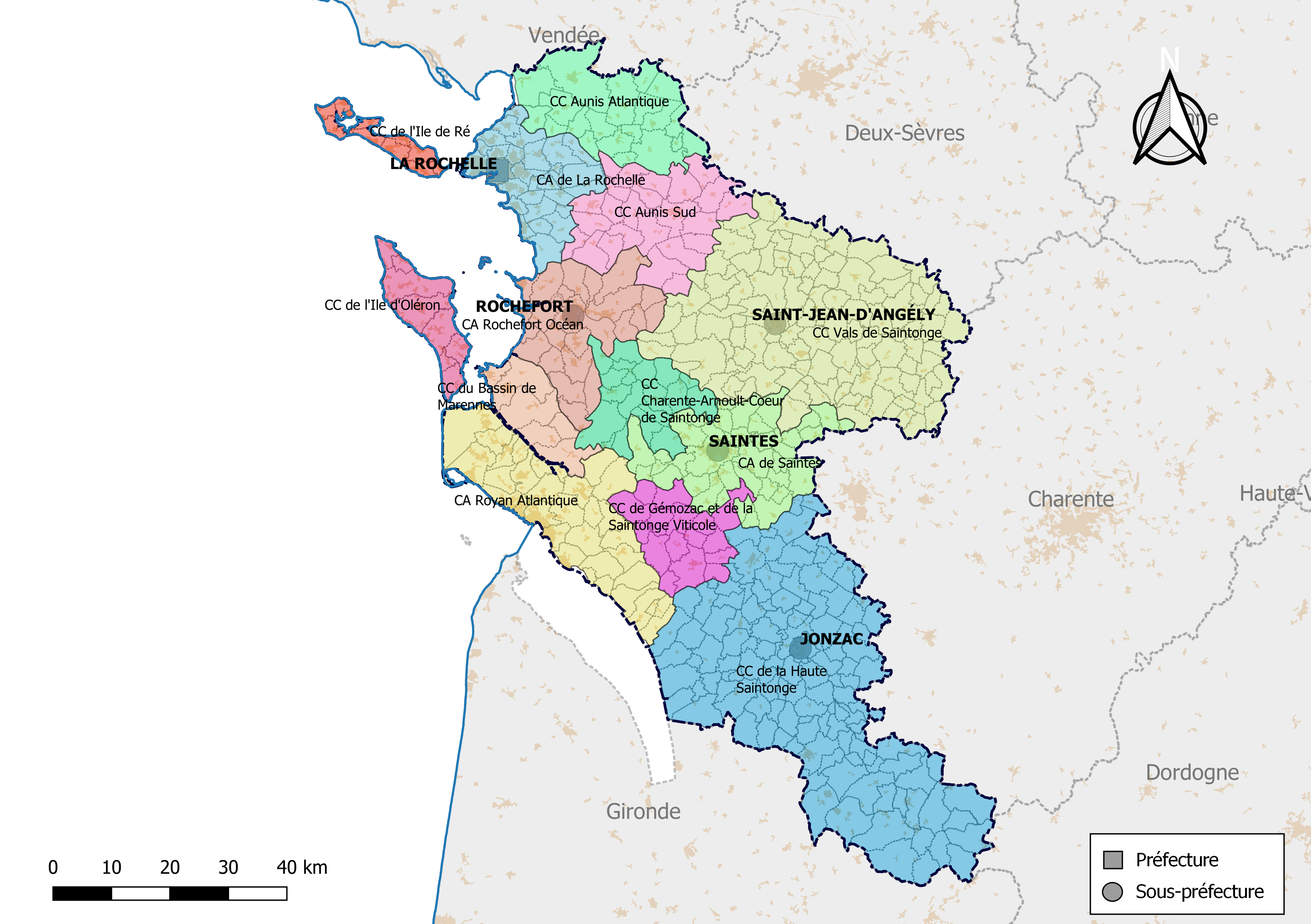 Carte des intercommunalités du département de la Charente-Maritime, France. Composition au 1er janvier 2019